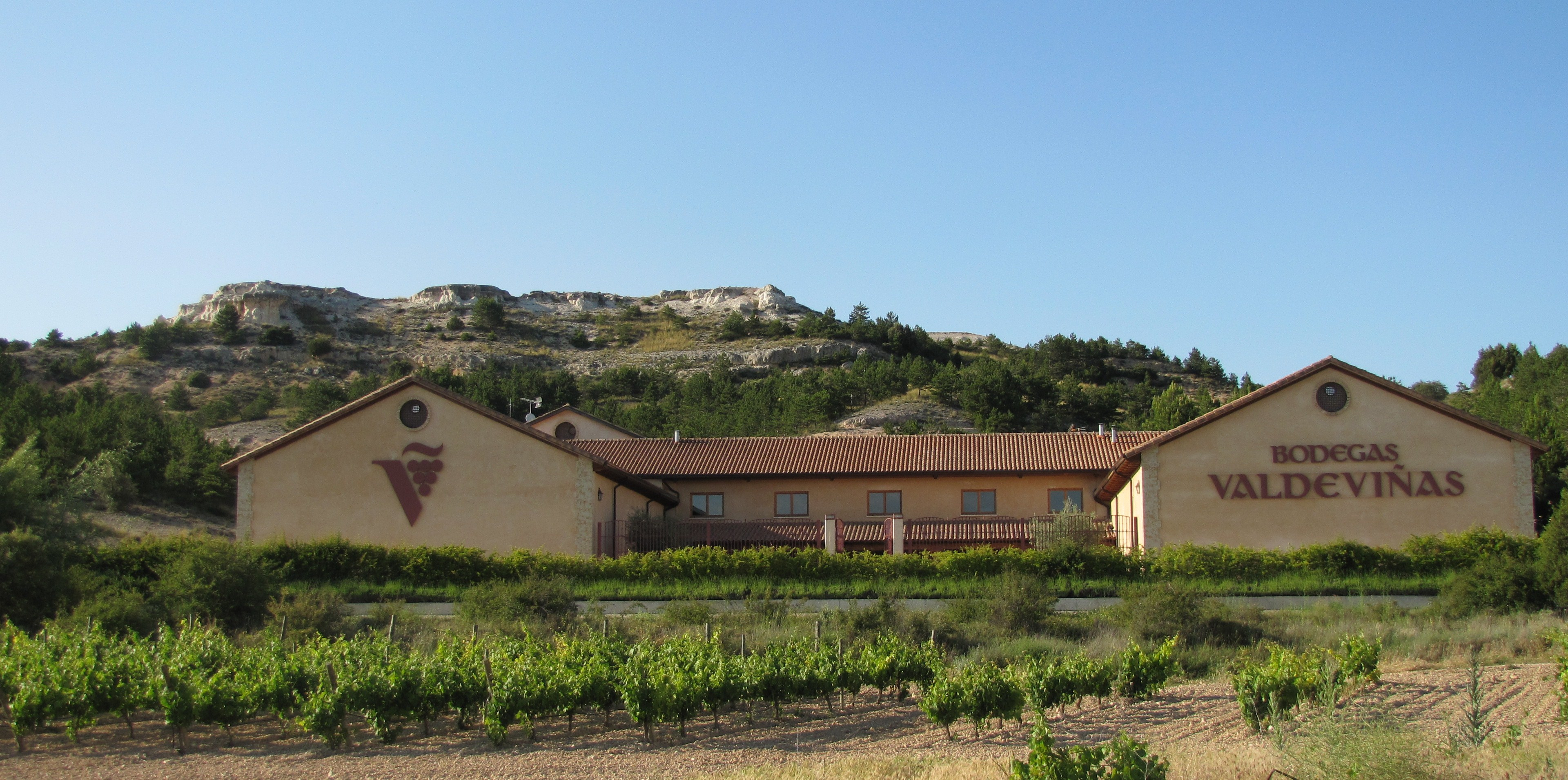 Fotografía de la Bodega Valdeviñas, en Langa de Duero, Soria (España), en la comarca de la Ribera del Duero. La bodega se encuentra al pie de una colina y frente a ella se observan algunos de sus viñedos con cepas de tempranillo.